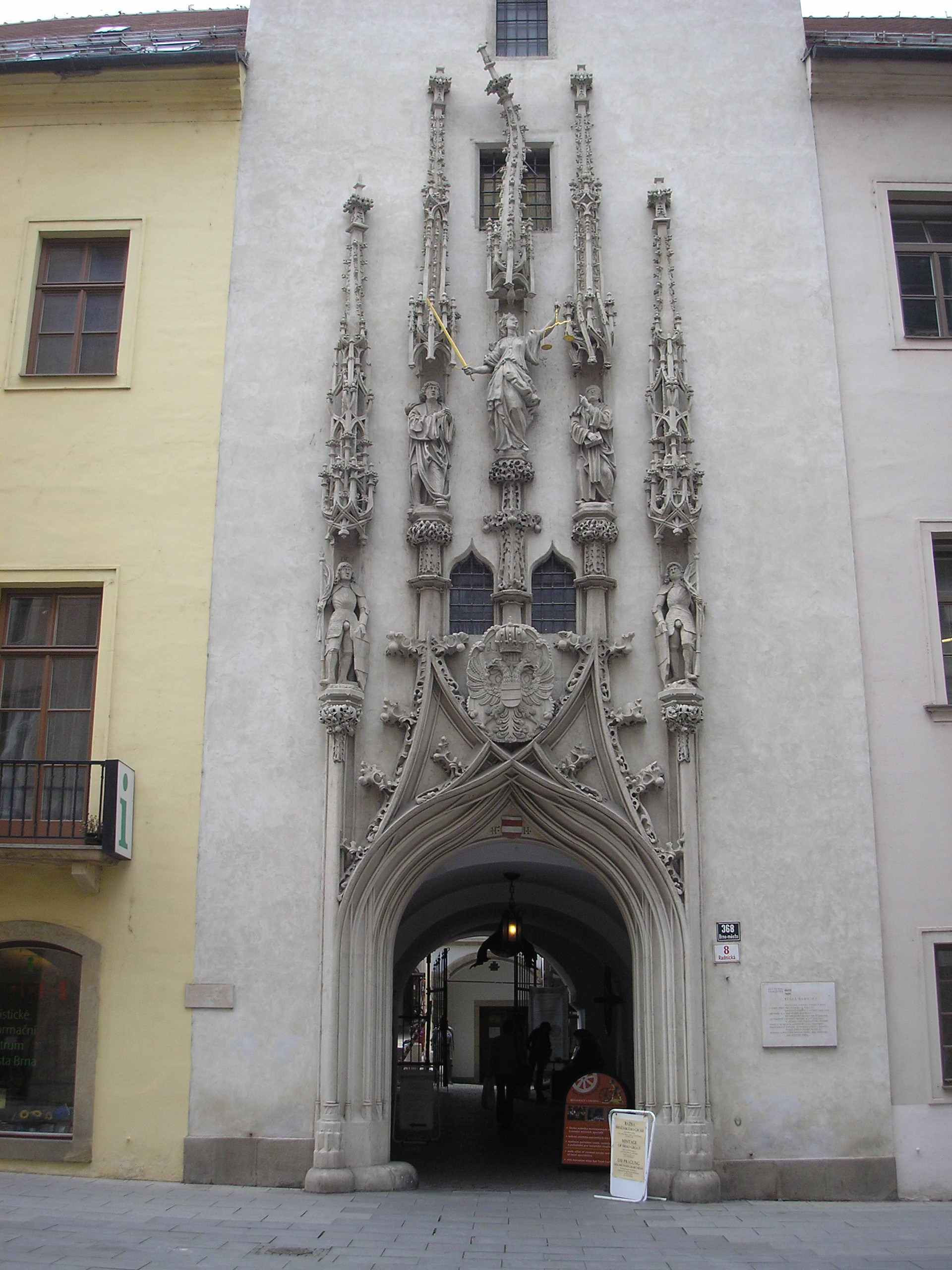 Portal des Brünner Rathauses